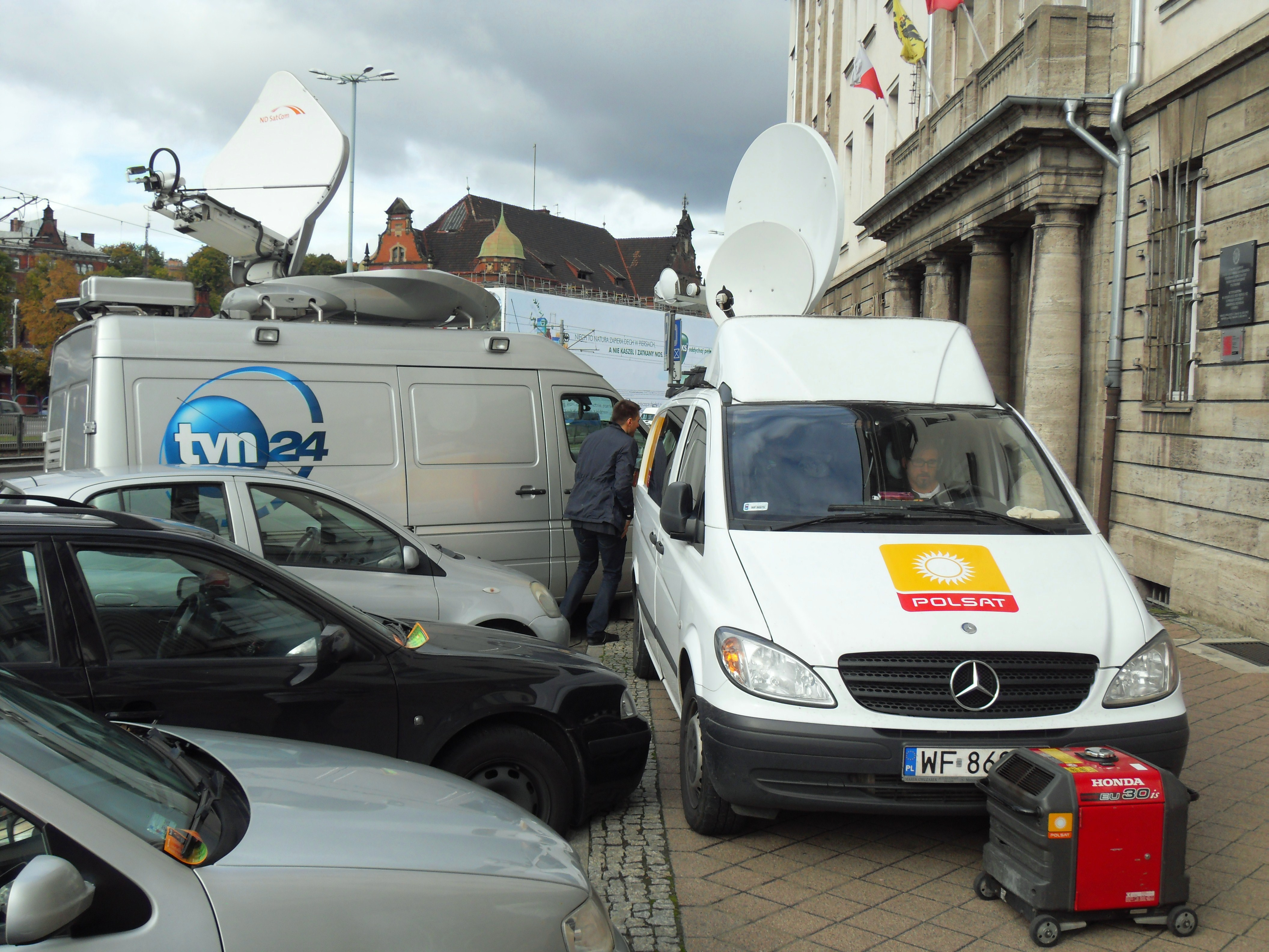 Gdańsk Śródmieście, ul. Wały Jagiellońskie. TVN24 i Polsat, wozy reporterskie.